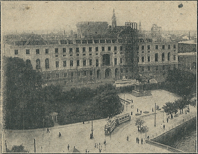 Opførelsen af det tredje Christiansborg. Fotografi fra 1914.